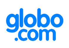 Logotipo do provedor .